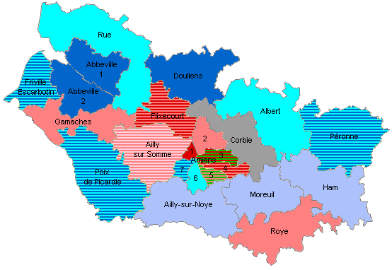 Conseil départementale de la Somme en 2015